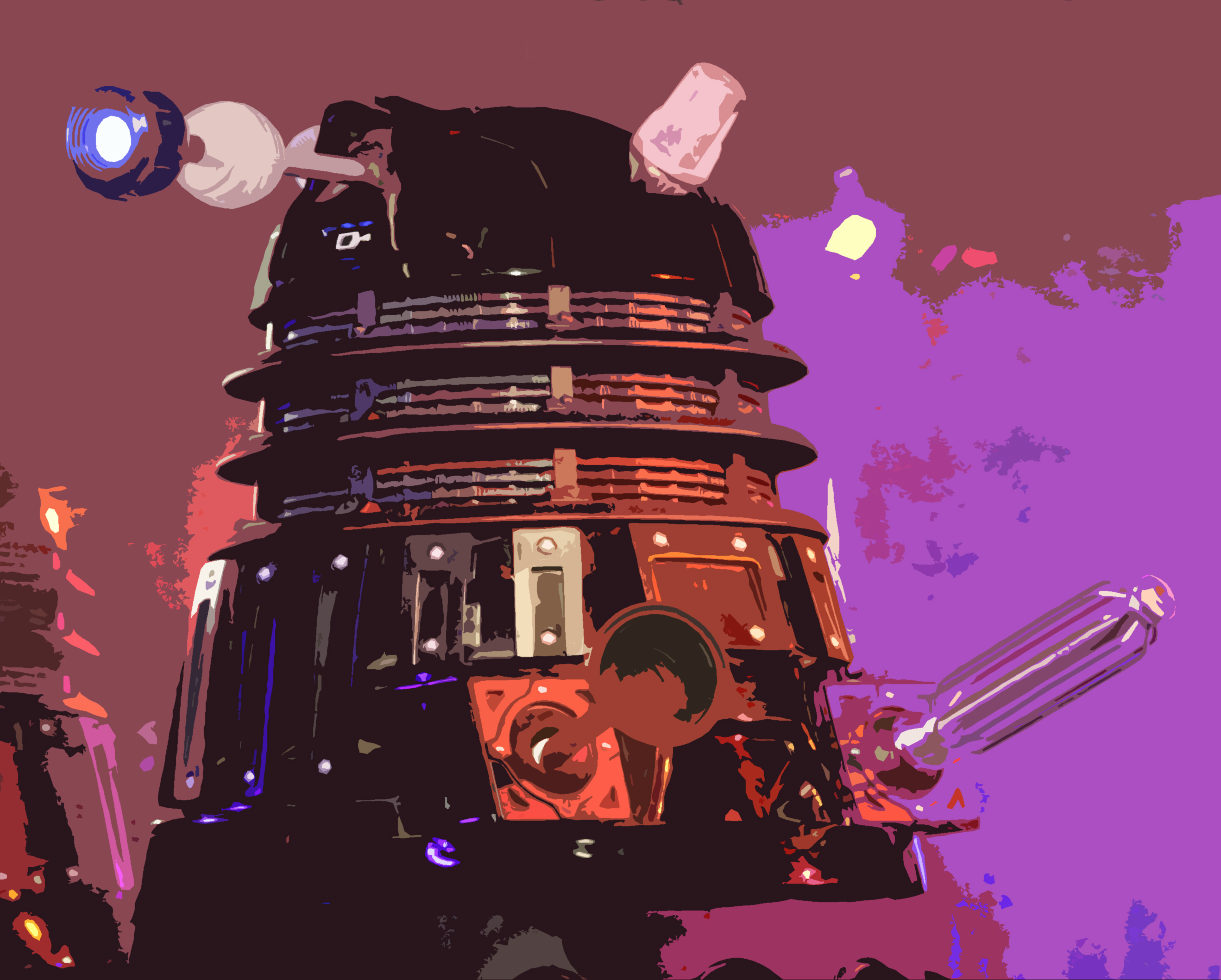 Dalek 4